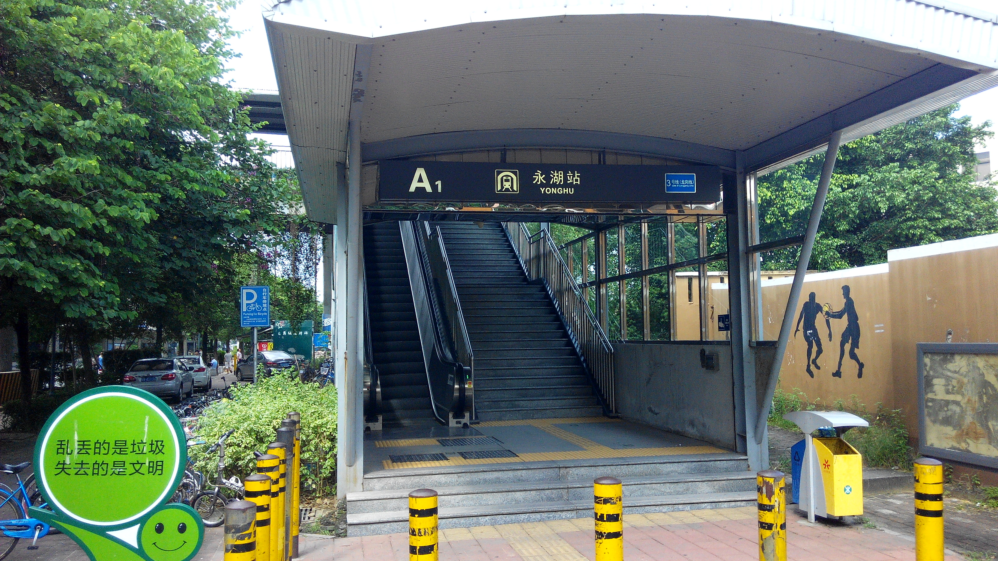 深圳地铁三号线 永湖站A1出口